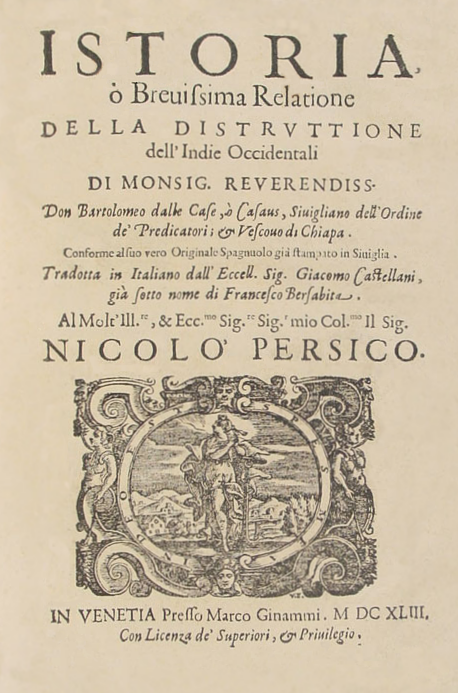 Portada del Istoria, ò, Breuissima Relatione della distruttione dell'Indie Occidentali. Publicado en Venecia en 1643 por Bartolomé de las Casas.